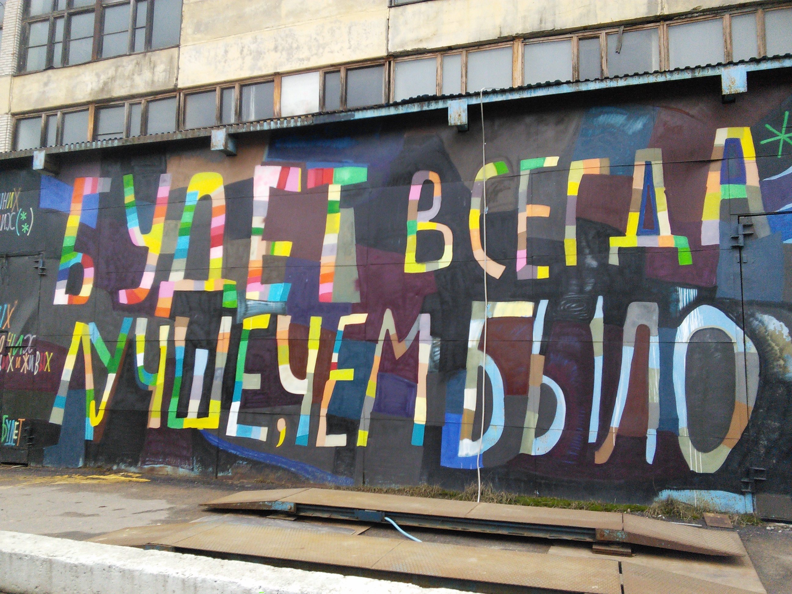 Работа Кирилла Кто «Иногда да, иногда нет» в Музее уличного искусства (с экскурсии, весна 2015)